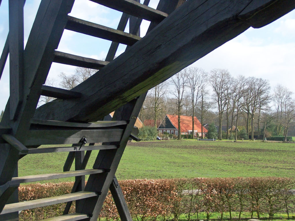 Picture Wissinks Möl (Windmill in Usselo, Enschede, Netherlands)